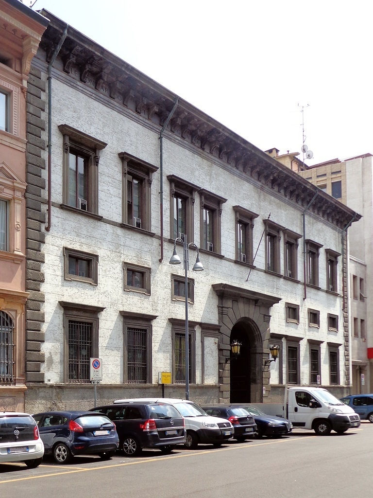 Milano, la facciata di palazzo Spinola, in via San Paolo 10.